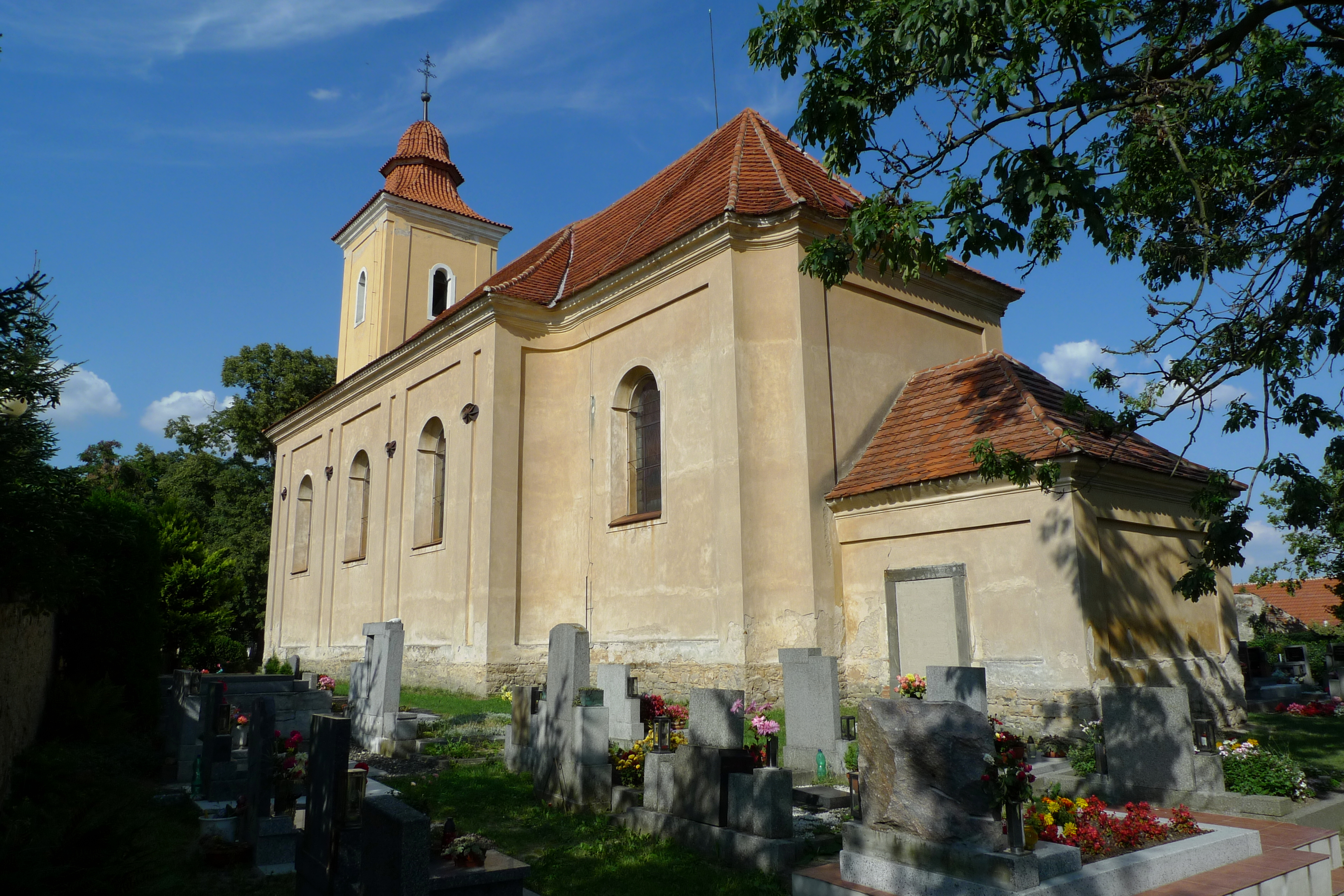 Kostel sv. Martina ve Vyšehořovicích v okrese Praha-východ.